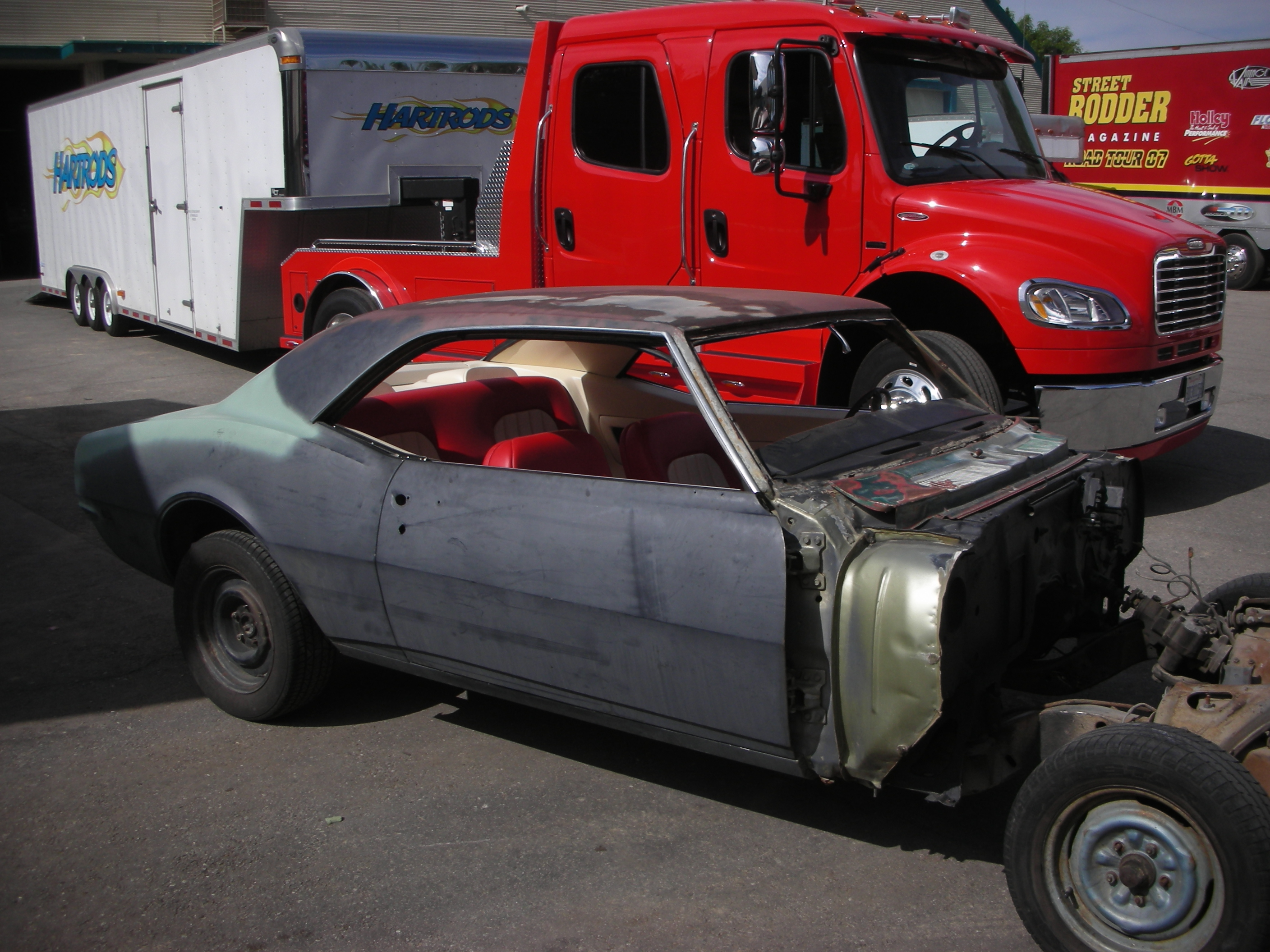 CAMARO 092